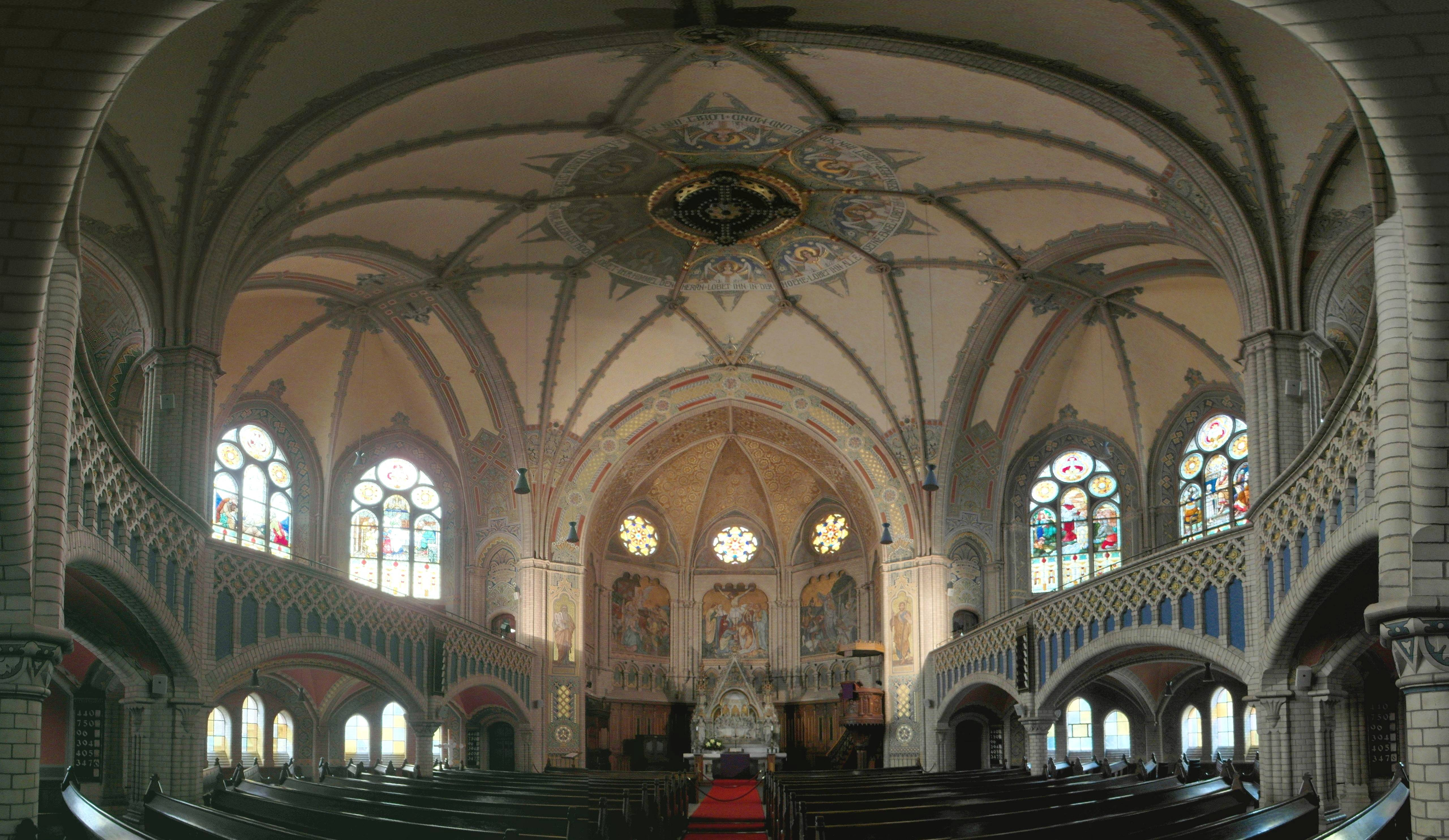 Altenburg Brüderkirche Panorama